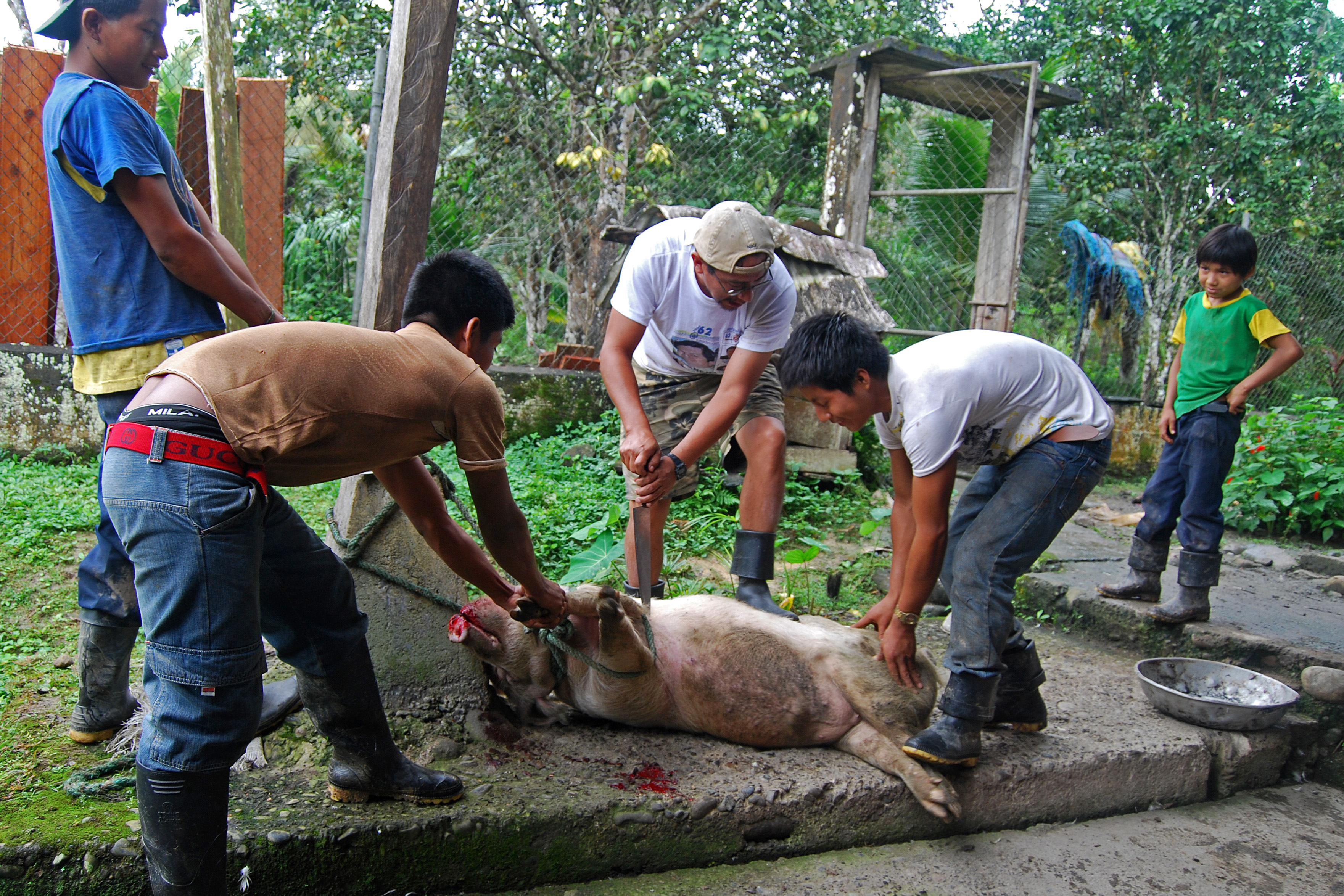 Salesiano mission, Yaupi, Morona-Santiago Prov., Ecuador